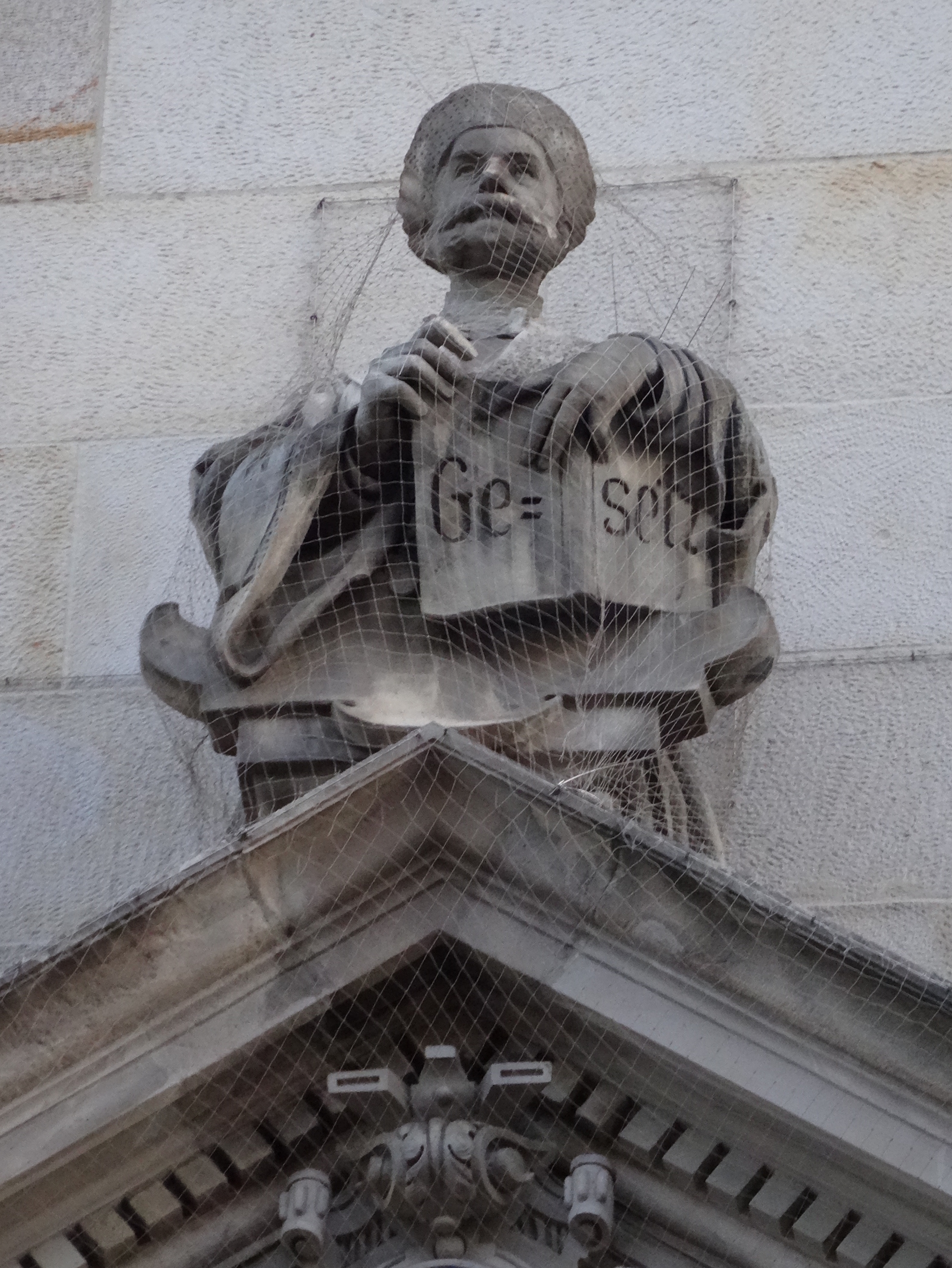 Der Oberlandesgerichtspräsident Ernst Friedrich Sieveking